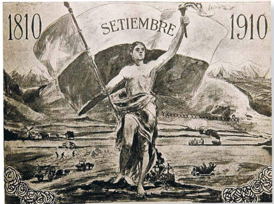 Alegoría a la independencia de Chile en 1910.